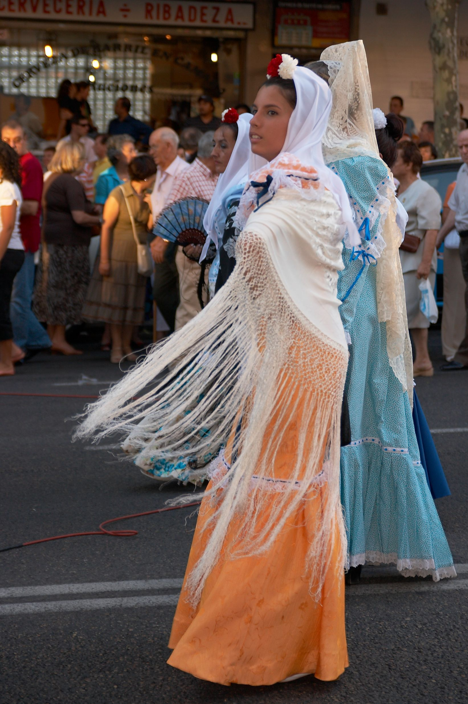 Fiestas de la Paloma 2007, Madrid, España.